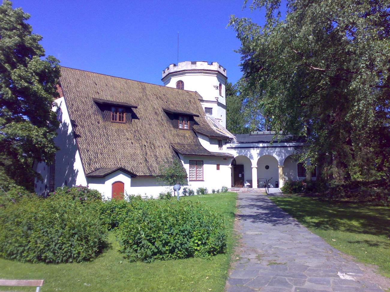 Photo of Tarvaspää, Espoo (Finland)